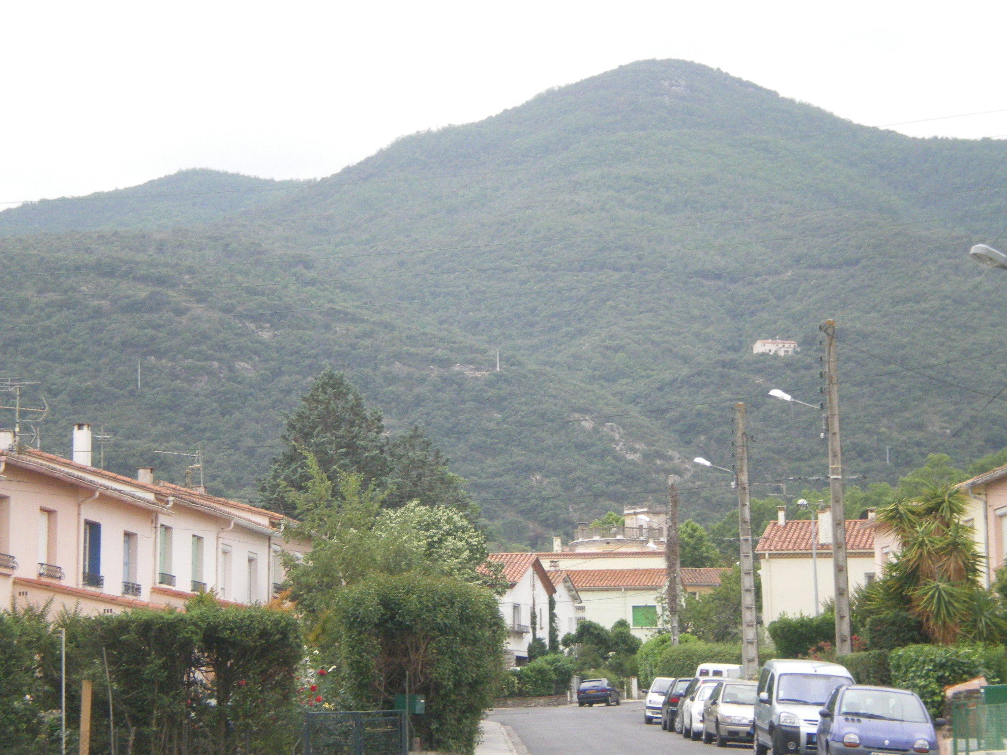 Pic de Garce Ceret